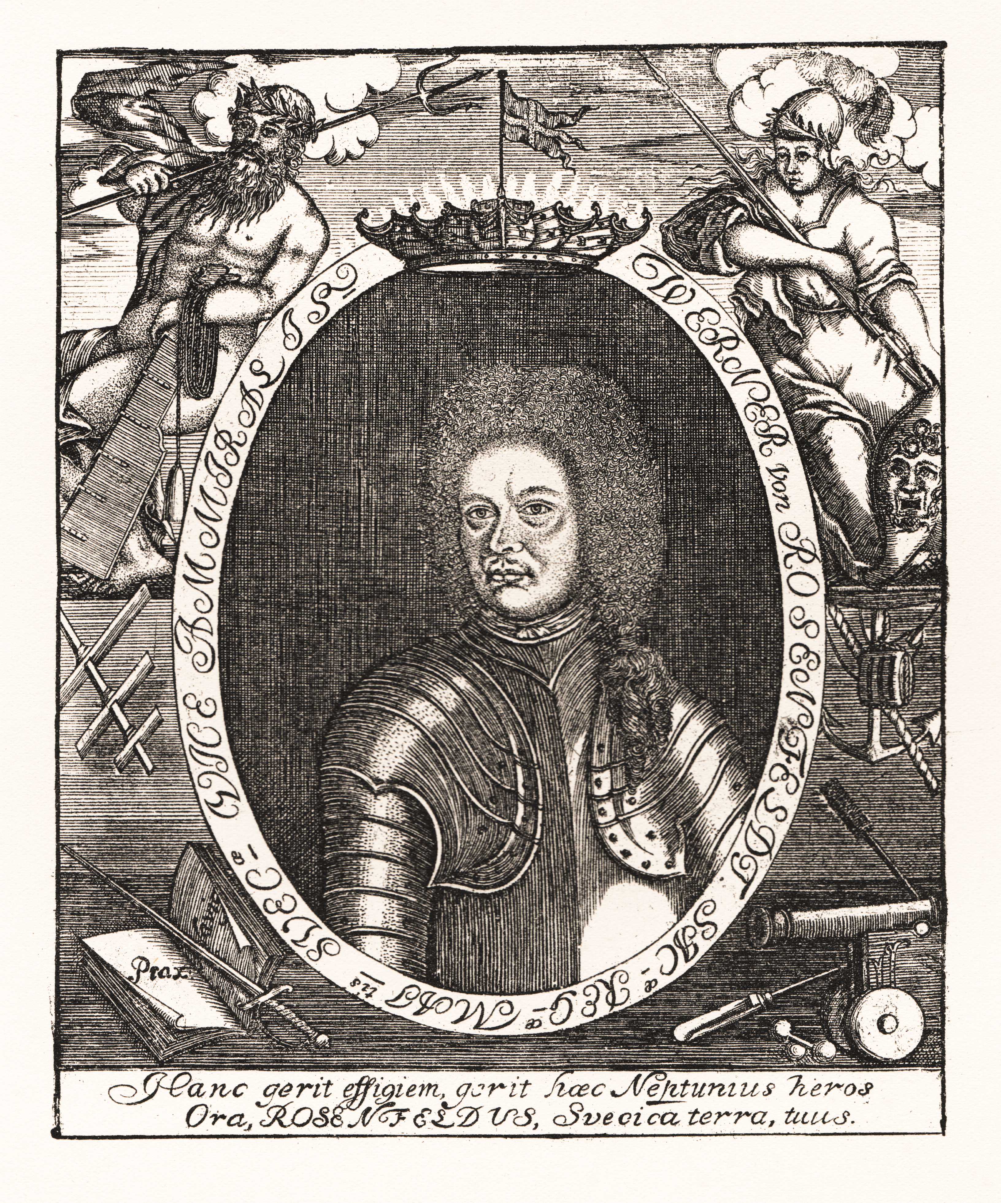 Werner von Rosenfeldt (1639-1710). Tvenne graverade porträtt af honom äro kända, det ena torde vara mycket sällsynt samt är utfördt af P. van Gunst. Det andra, avbildat här, finns i Rosenfelts bok “Navigationen eller styrmanskonsten“, har en något äldre typ samt påminner om vissa tyska stick från senare hälften af 1600-talet; det anses vara graveradt af Nils Ström, adlad Strömcrona; under detta senare läses: Hanc gerit effigiem, gerit hæc Neptunius heros ora, Rosenfeldus, Svecia terra, tuus. Om Rosenfelt se vidare K. F. Werner: En praktupplaga 1702 af en karta öfver Stockholm och J. A. Almqvist: Samlaren 1896 s. 75 och följ.